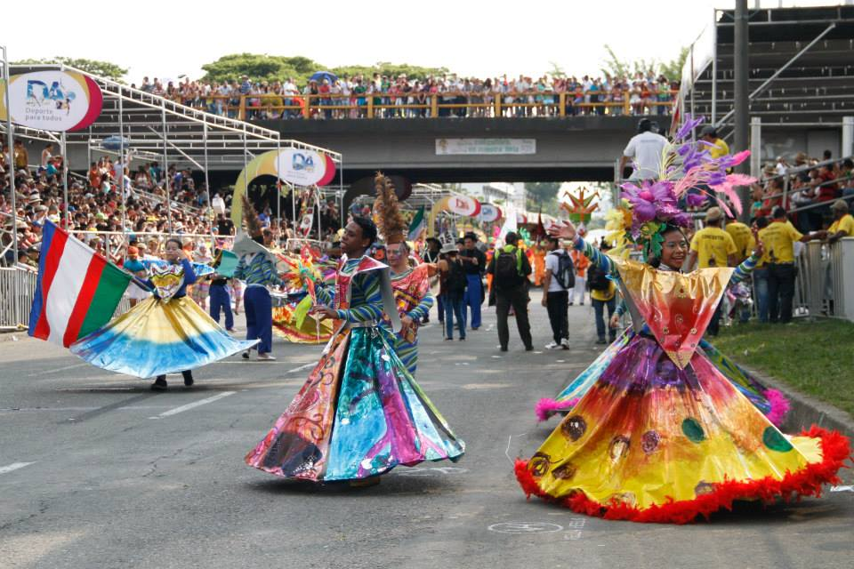 Cali Viejo